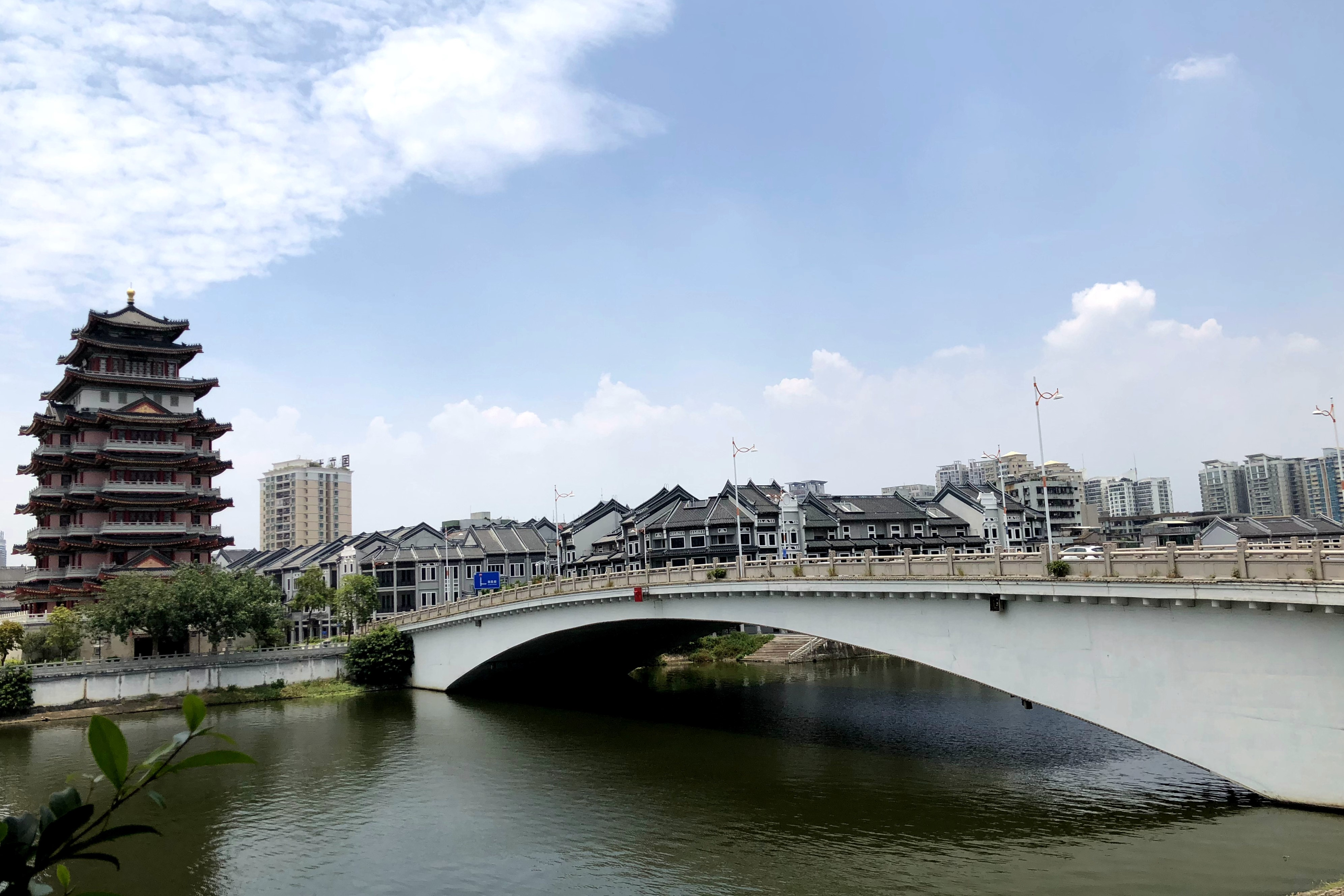 中文（中国大陆）: 合江楼、东新桥